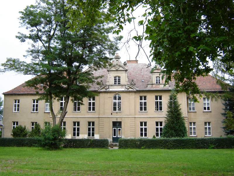 Karow, Sachsen-Anhalt, Gutshaus